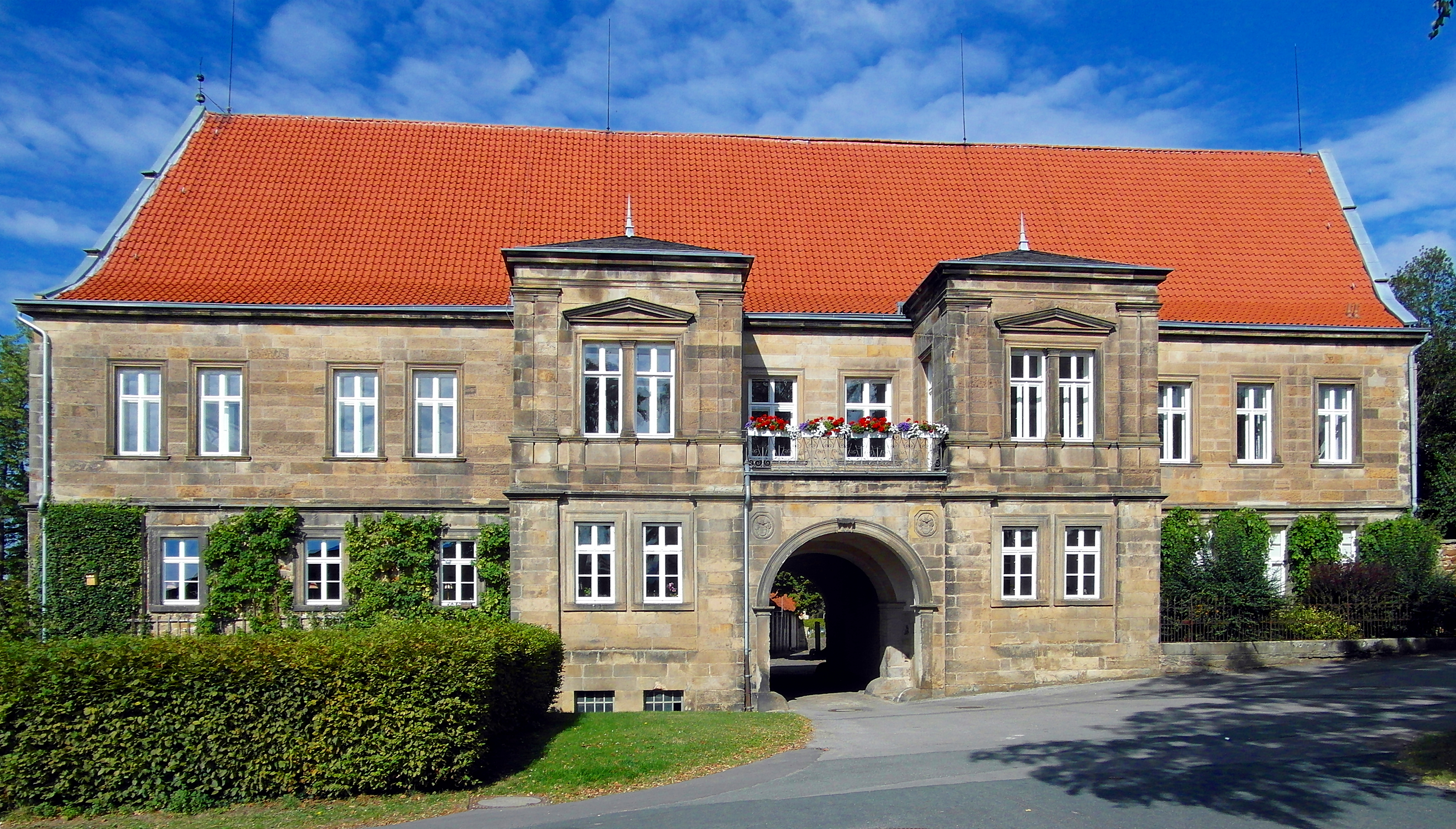 Herrenhaus des Ritterguts Stemmen. Baujahr unbekannt. Der Giebel des dreiflügeligen Wohnhauses ist im Stil der Weserrenaissance um 1600 gestaltet. der Vorbau mit Tordurchfahrt wird anhand des Wappens der Familie von Reden auf 1672 datiert. Im 19. Jahrhundert versuchten 2 hannoversche Könige vergeblich, das Gut zu kaufen. 1875 wurde die Vorderfront umgestaltet und dabei das Fachwerk mit Quadersteinmauerwerk verblendet.